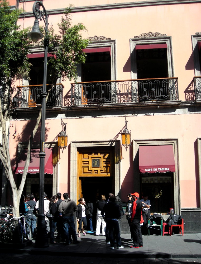 Fachada del restaurante Café de Tacuba, Centro Histórico, México